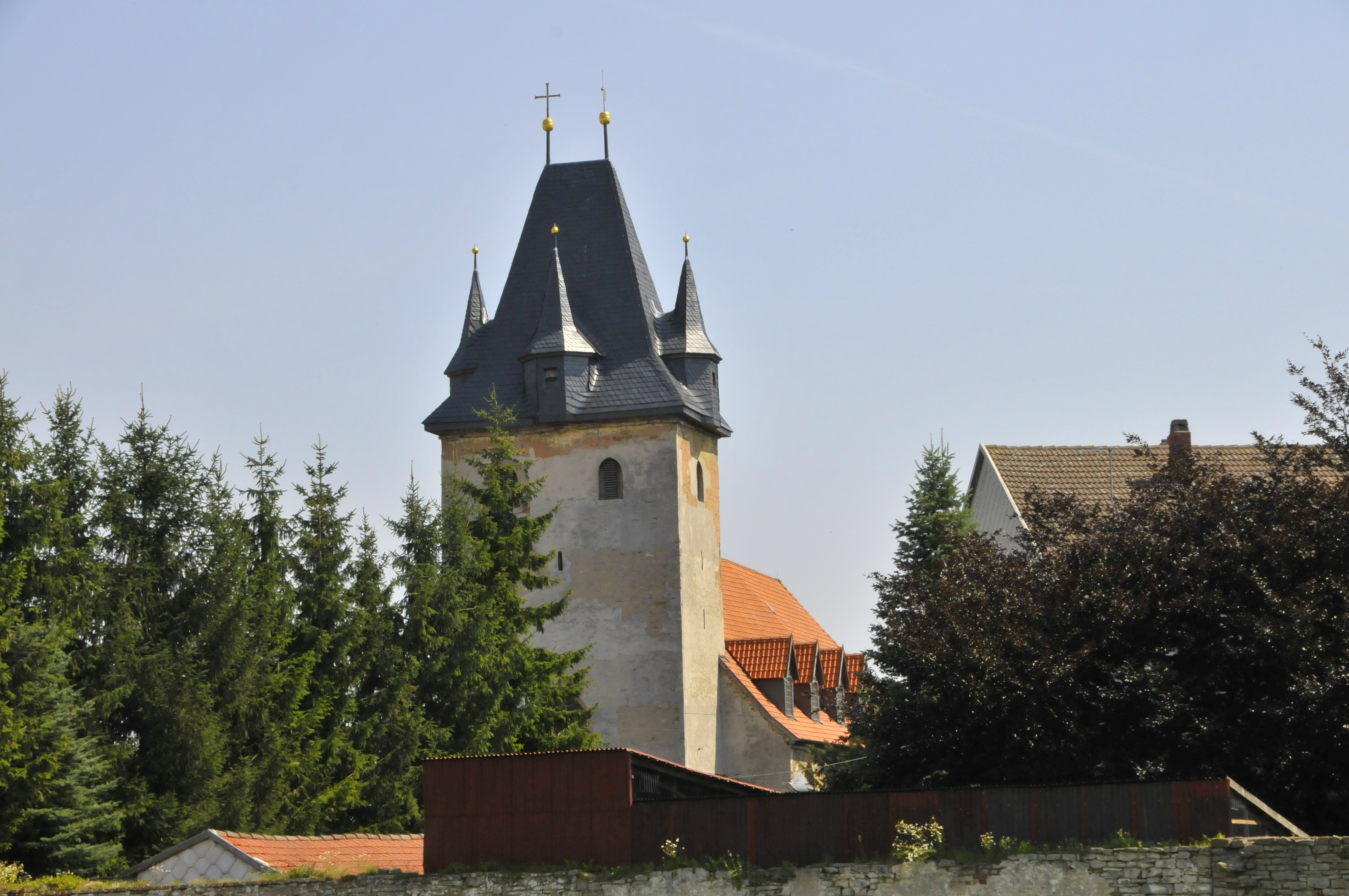 Großenehrich, Kirche